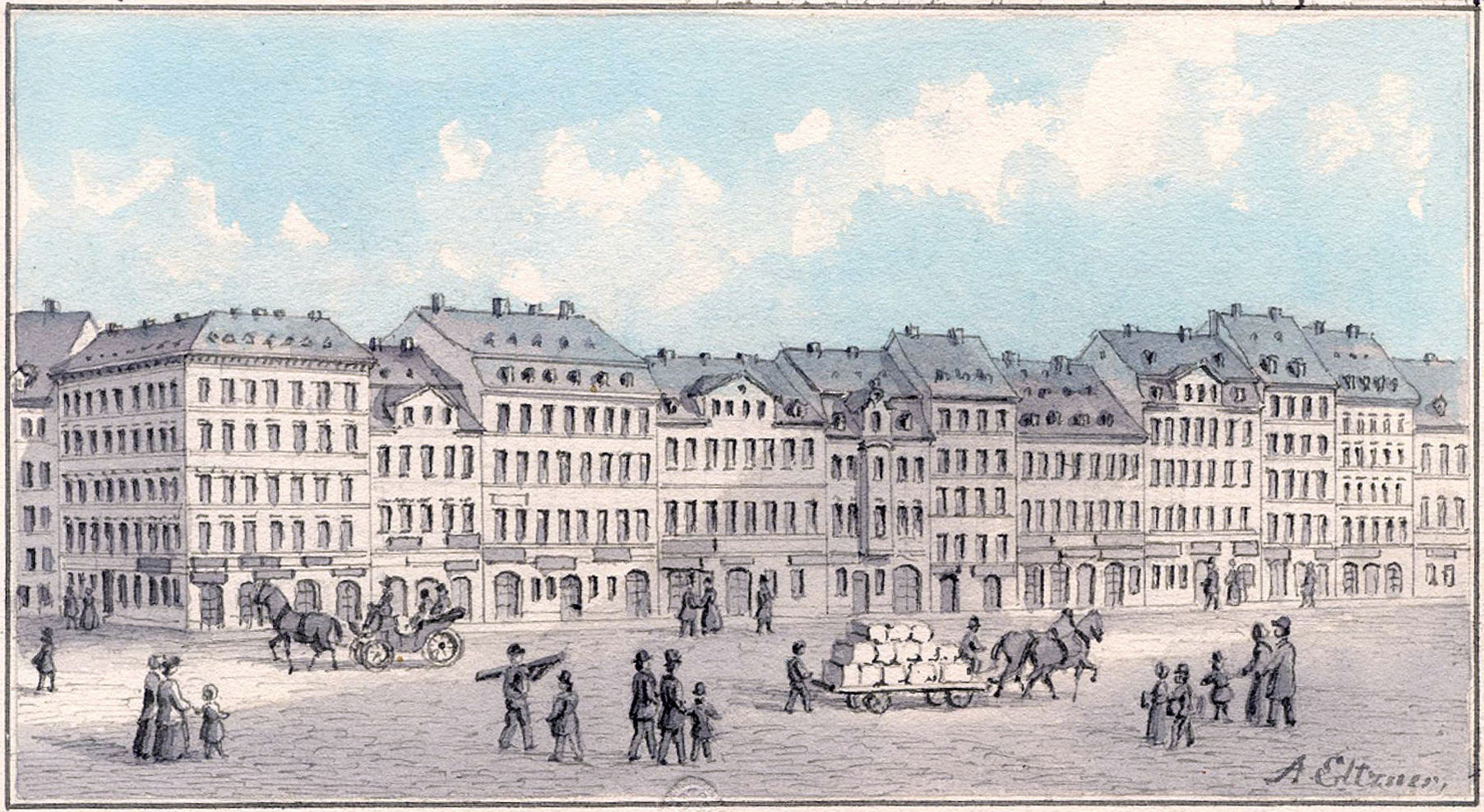 Brühl in Leipzig zwischen Theaterplatz und Plauenscher Straße, nördliche Straßenseite mit den Häusern (v.l.n.r.) Nr. 1, Nr. 3 („Zum roten und weißen Löwen“, Richard Wagners Geburtshaus), Nr. 5 („Zum weißen Löwen“), Nr. 7 („Zu den drei Schwanen“), Nr. 9 („Zum roten Ochsen“) Nr. 11 („Zum schwarzen Rad“), Nr. 13 („Zur grünen Tanne“), Nr. 15 („Zum Kranich“), Nr. 17, Nr. 19 („Schönkopfsches Haus“), Nr. 21 („Goldner Apfel“), lavierte Federzeichnung von Adolf Eltzner, um 1860